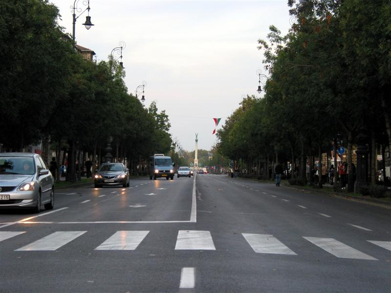 Andrássy út, Budapest, Hungary